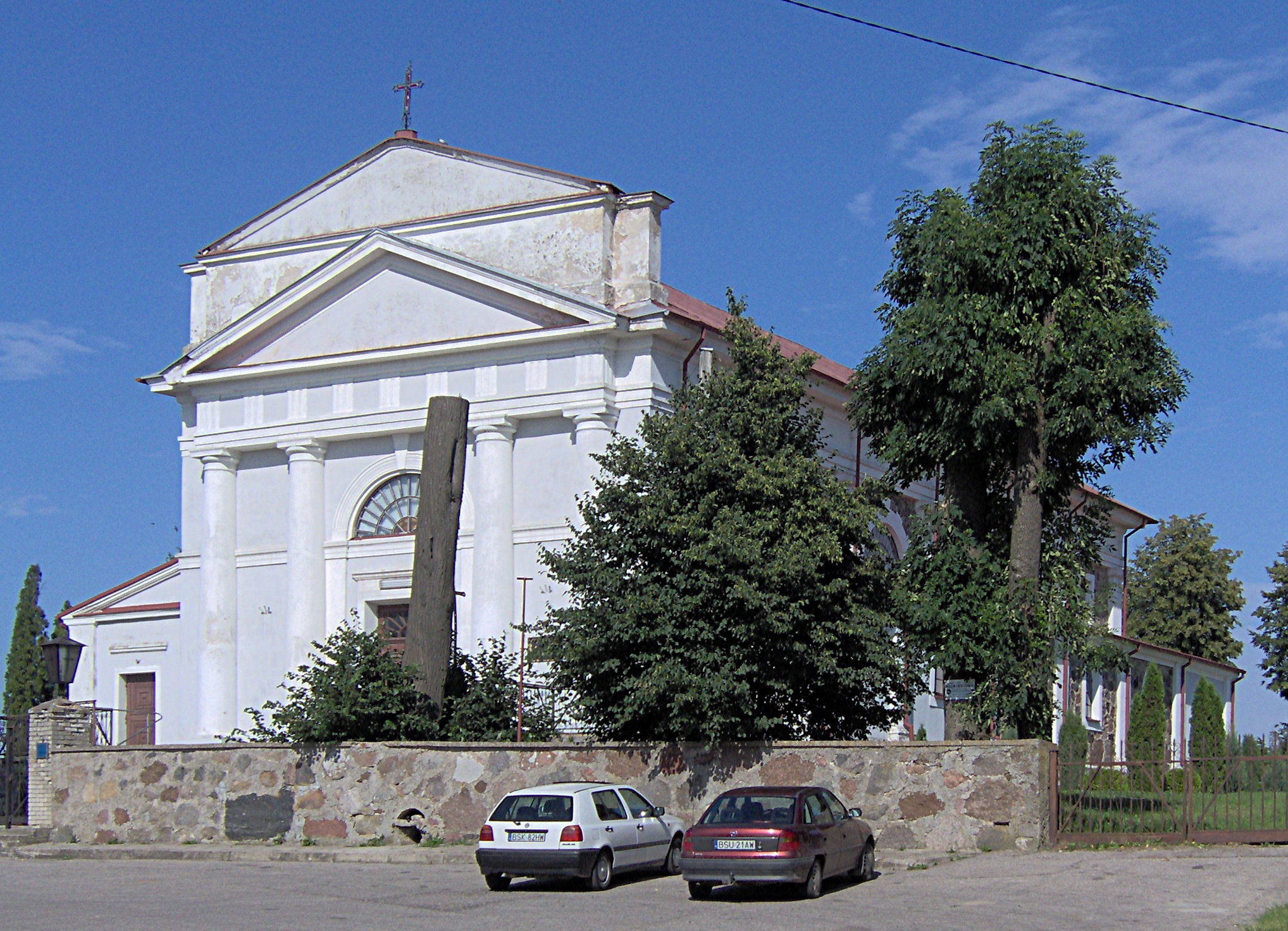 Filipów - kościół parafialny p.w. Wniebowzięcia NMP, mur., 1838 (zabytek nr 653 z 10.03.1989)